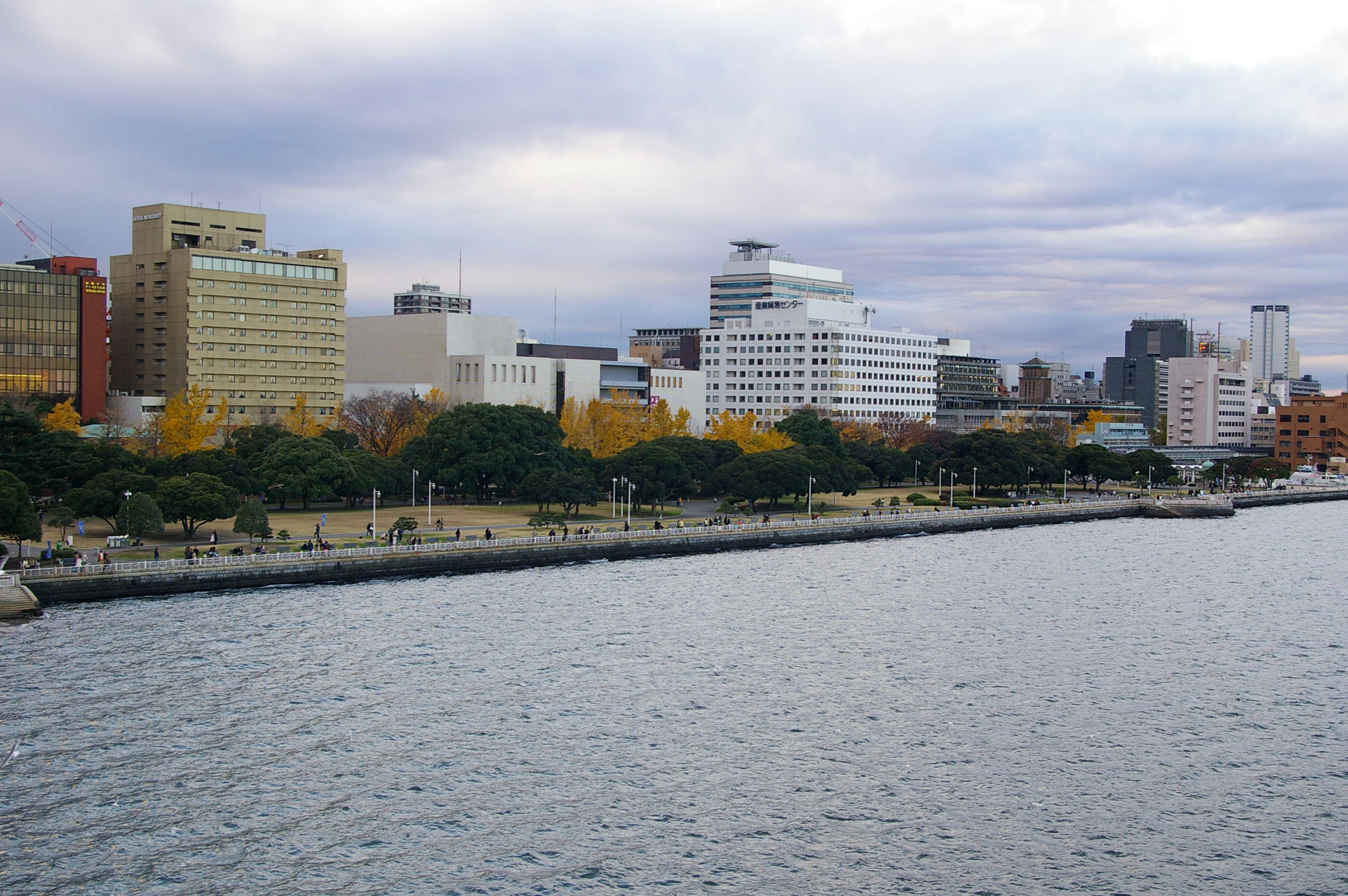 Yamashitakouen, Yokohama,Japan Taken by Los688,2006-12-10 PD-self 山下公園 氷川丸から 2006年12月10日撮影